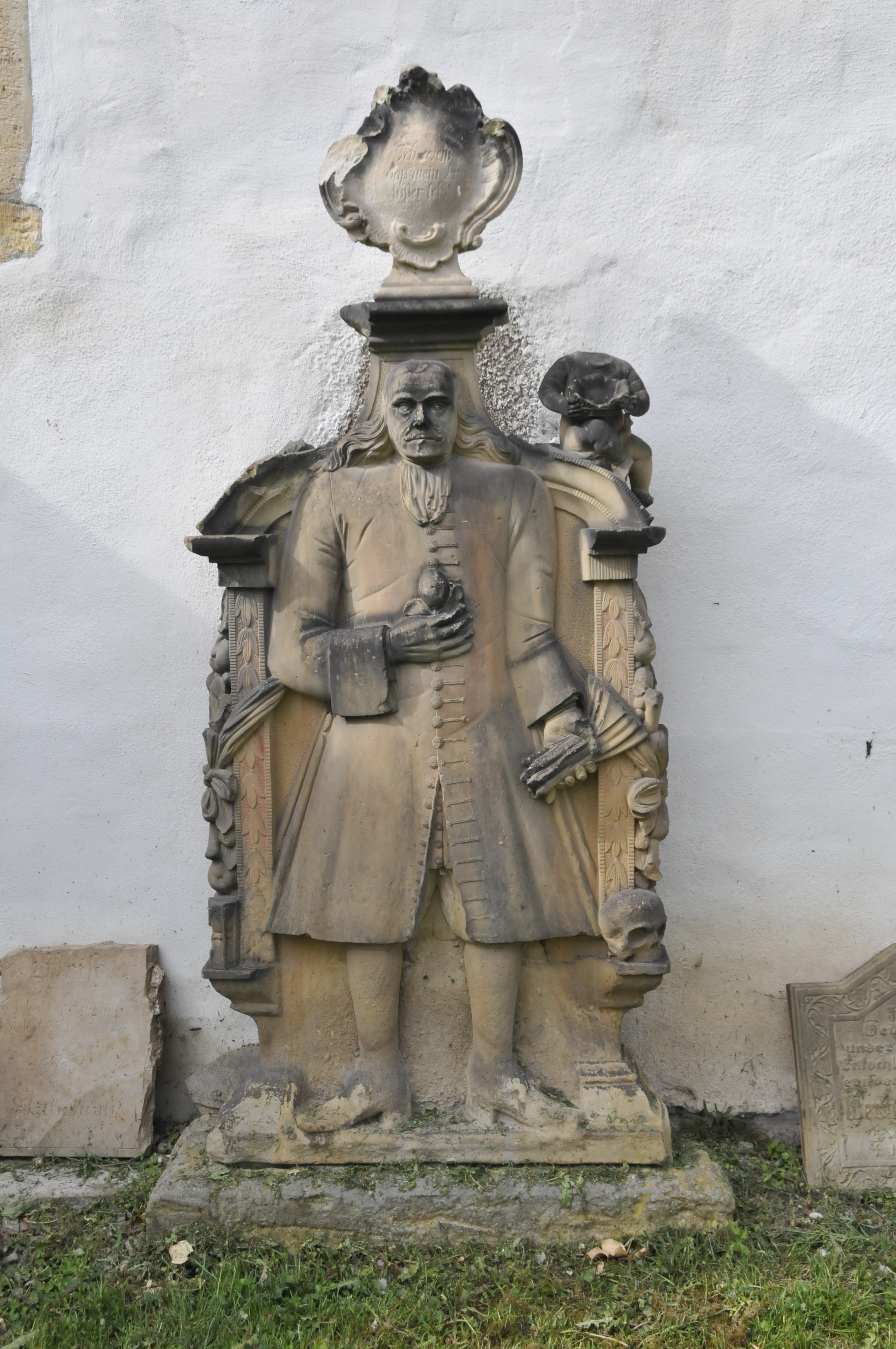 Cobstädt, Grabplatte an der Kirchenmauer